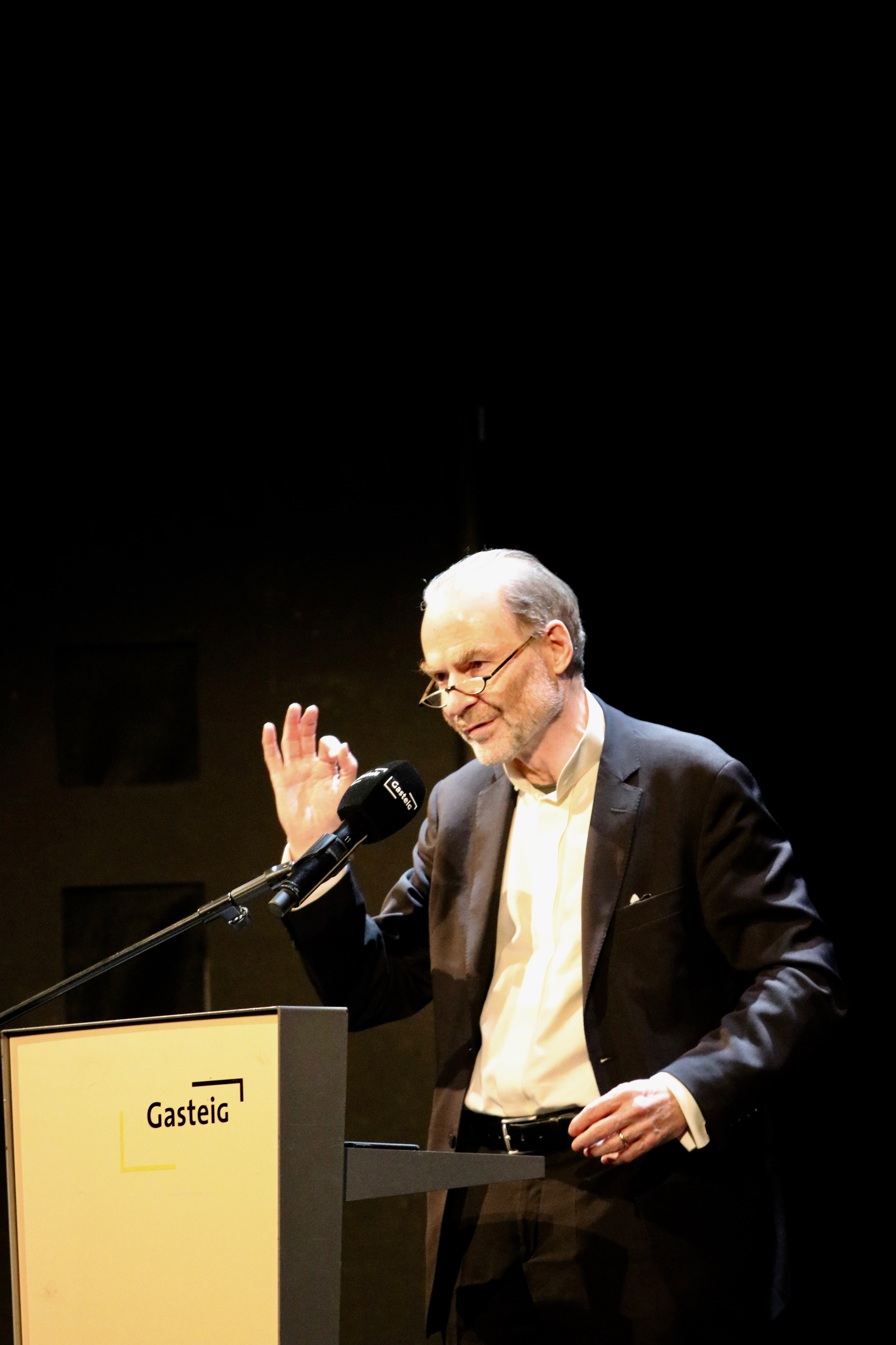 Timothy Garton Ash, britischer Historiker und Schriftsteller, bei der Eröffnung des Münchner Literaturfests 2019